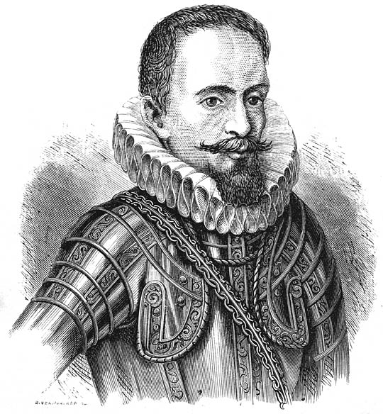 Portrait of naval commander Jacob van Heemskerk - Project Gutenberg eText 17468